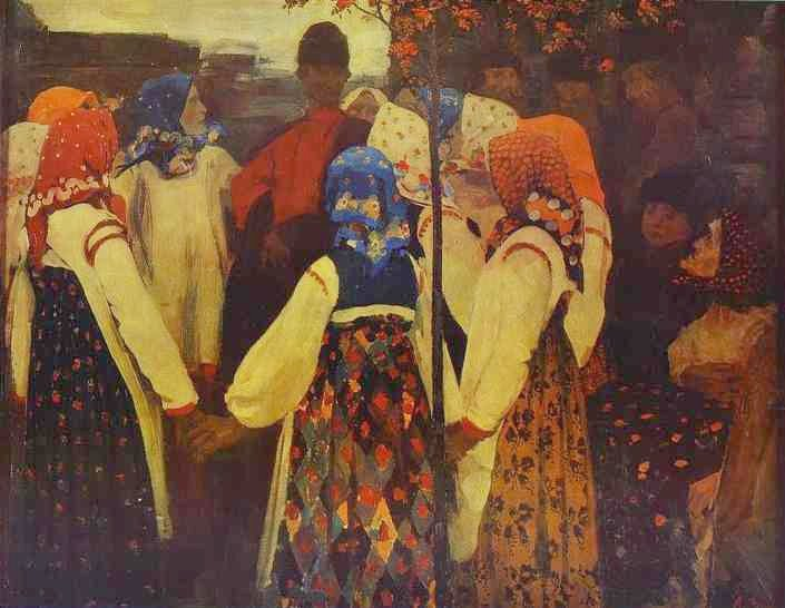 Андрей Рябушкин. Втёрся парень в хоровод, ну, старуха охать... 1902.